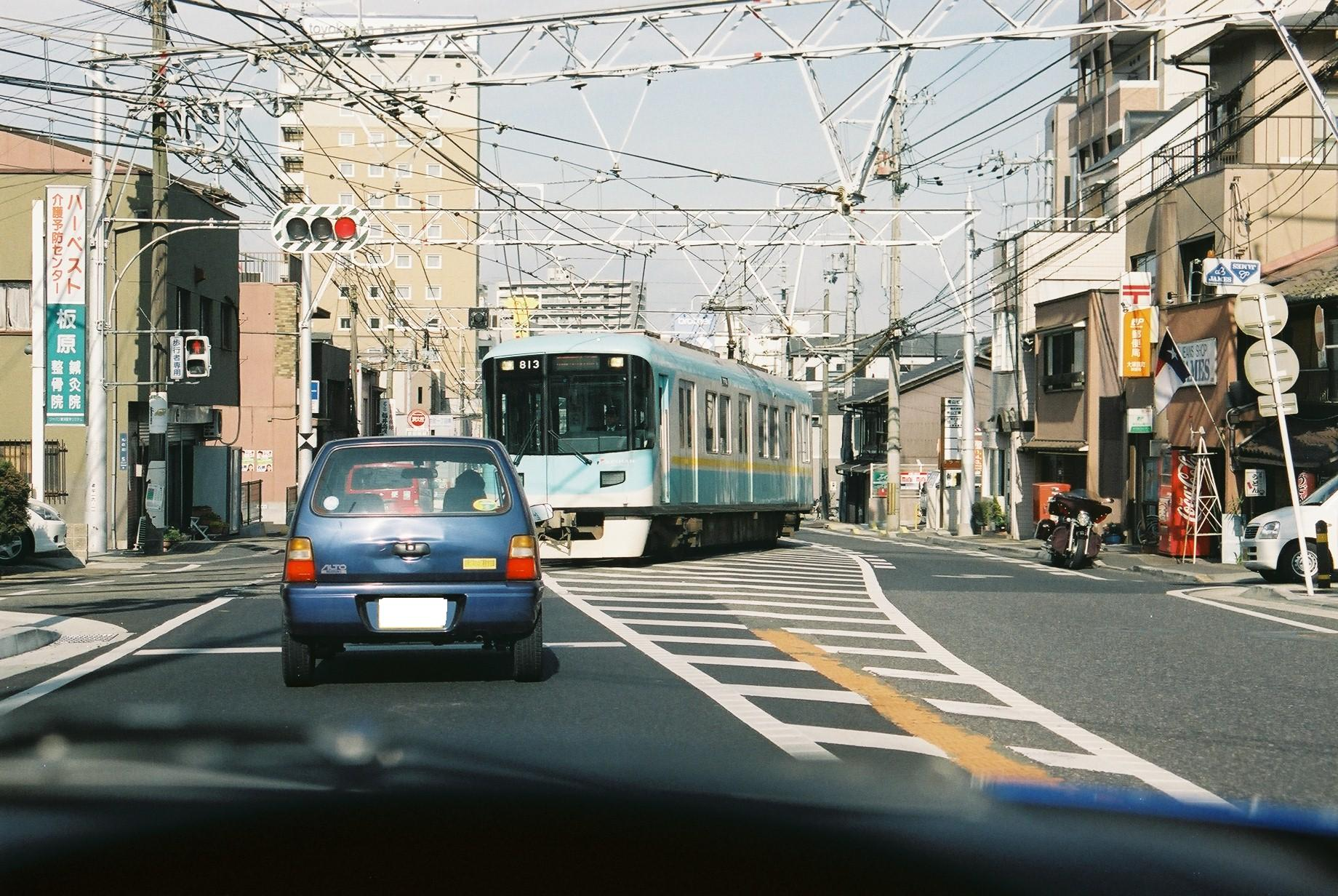 京津線が軌道から専用路線に入る地点です